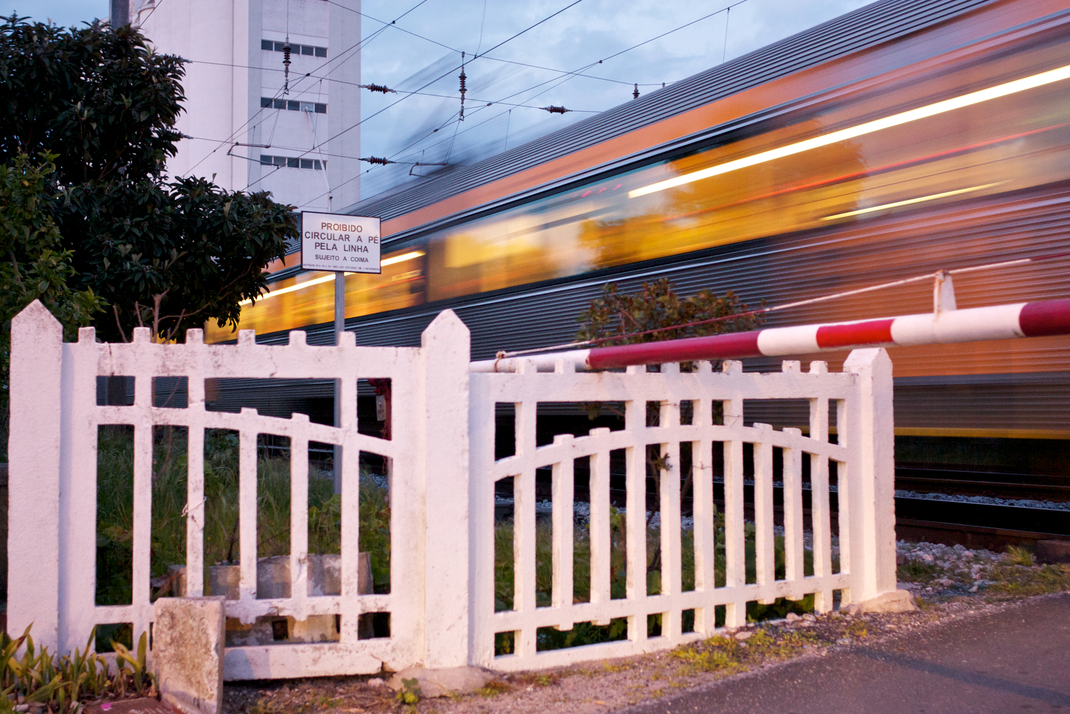 Tipo: E Estação Local: Vale de Figueira [Linha do Norte, PK 83] Data e hora: 3 de Março de 2011 [18h46]